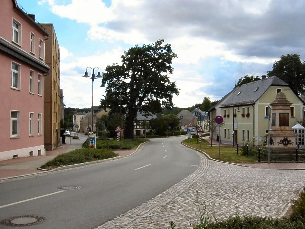 Die Eiche - Wahrzeichen der Stadt Berga (Elster), vom Brandplatz aus gesehen